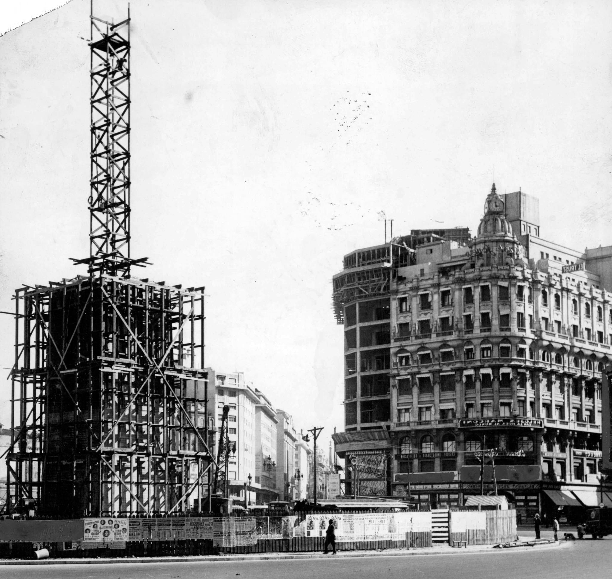 Buenos Aires. Obelisco en construcción, año 1936. Inventario AGN 5574.